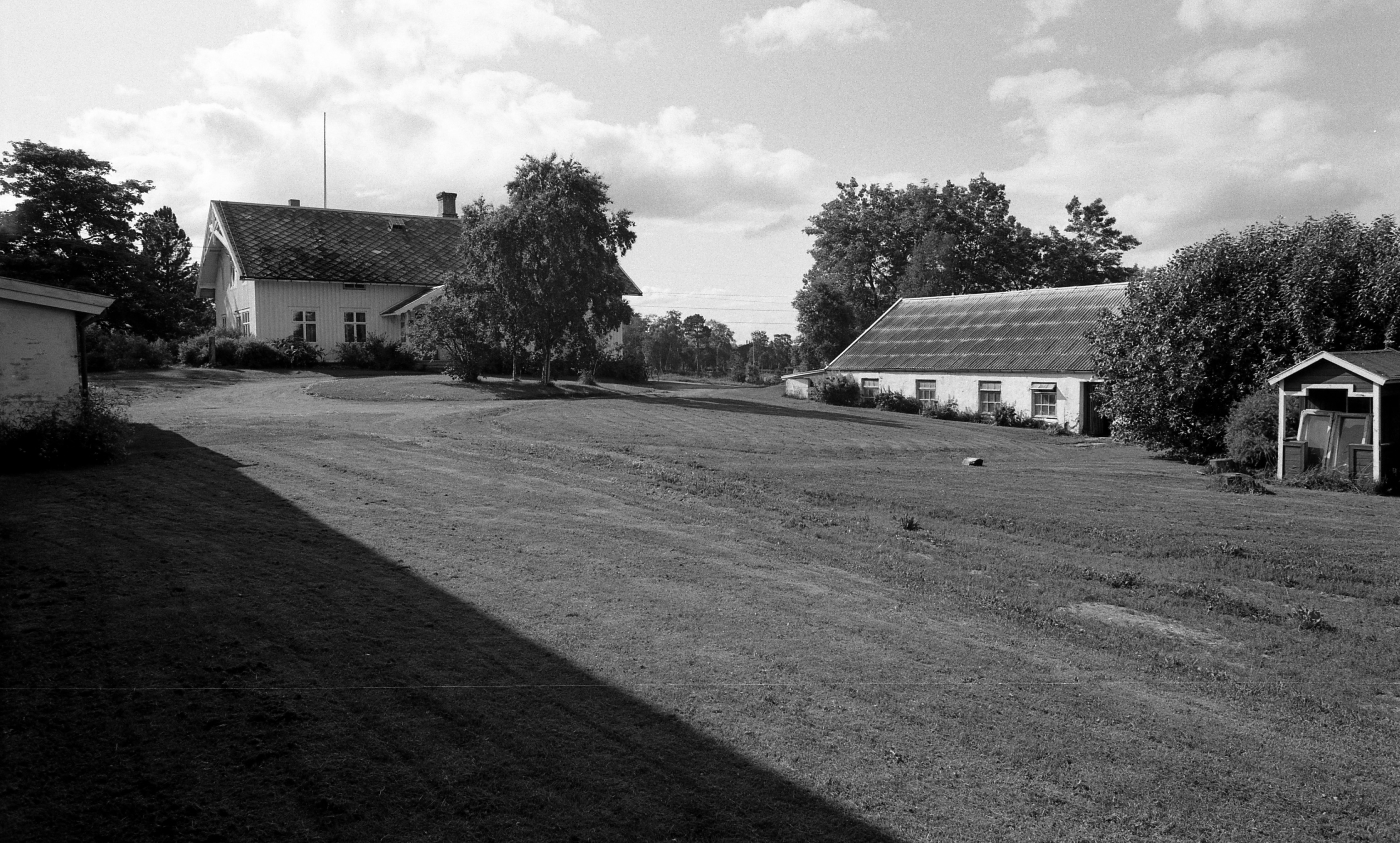 Bromstad (gnr. 13 bnr. 1) tilhørte i middelalderen domkapitlet og ble etter reformasjonen en del av biskopens prebende. I 1778 bygslet justisråd Carelius gården, og i 1783 hadde major Christian F. Meyer bygselen. I 1794 byttet majoren til seg gården mot to gårder han eide i Stjørdal. Fra 1820 tilhørte gården kaptein Mathias C. Stabell og senere hans sønn løytnant Aage F. S. Stabell. Han solgte gården til forvalter Peter Moxnæss, hvis enke satt med gården fram til 1908 da hun overdrog den til sin svigersønn Karl Jermstad. Jermstad solgte siden gården i 1929 til Ottar Vasseljen. Under Bromstad gård hørte husmannsplassene Bromstadgjerdet, Bromstadgrinden, Bromstadmark, Bromstadmyr og Bromstadplass. Under andre verdenskrig beslagla tyskerne 200 dekar av gården og dette området ble bl.a. benyttet som fangeleir for 700 sovjetrussiske krigsfanger. Gårdens hovedbygning er utført i sveitserstil og oppført av forvalter Moxnæss. En periode fungerte gården som tingsted og ett av rommene i hovedbygningen kalles fremdeles Tingstua. Kilde: Trondheim Byleksikon. Foto: Byantikvaren, fotograf Morten Kerr. Format: Negativ. Bilde tatt: Juli 1982(?) Film 225, negativ 47.